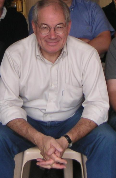 Le député maire de Bourg-en-Bresse Jean-Michel Bertrand lors d'un rassemblement de la fédération UMP de l'Ain.